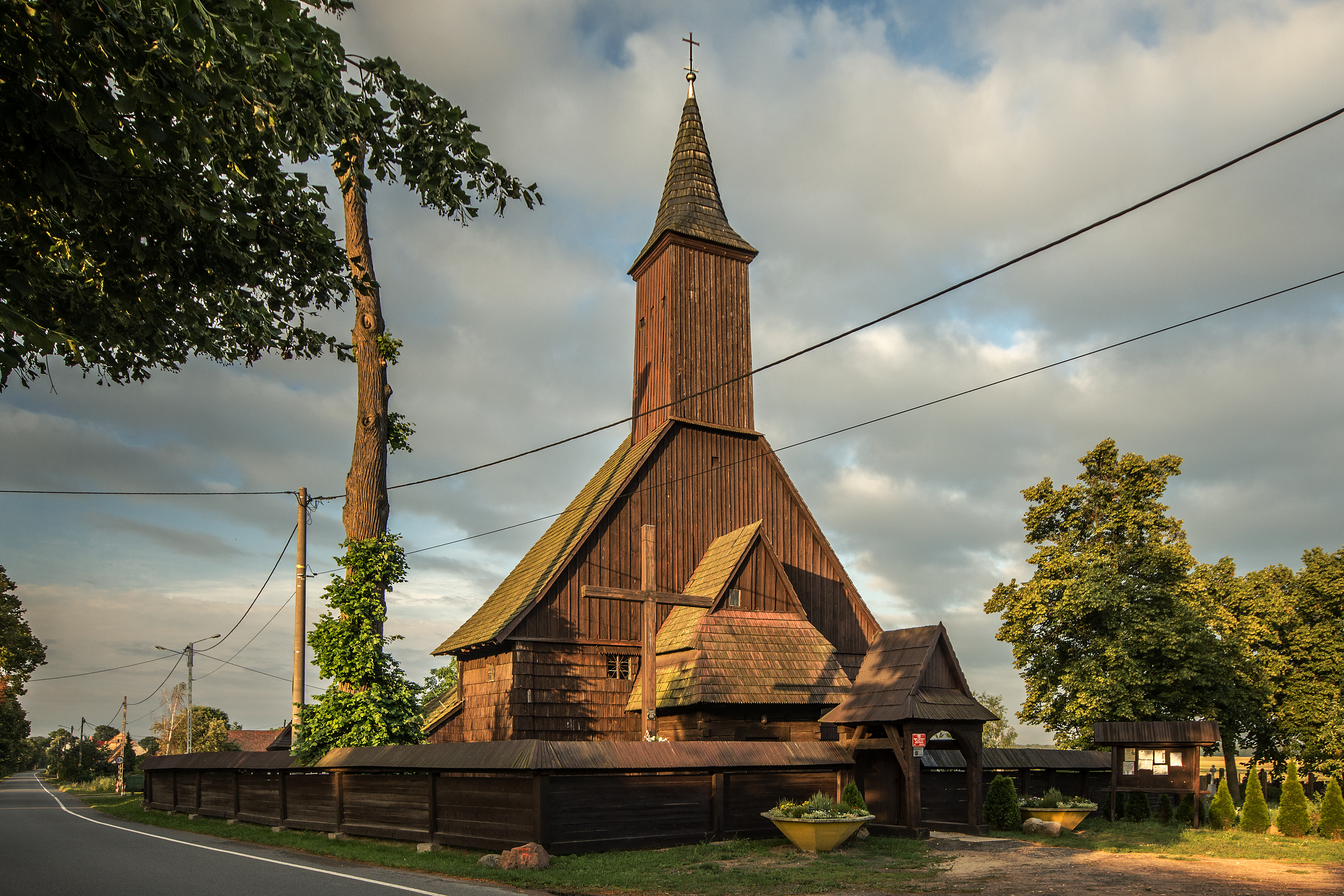 Brzezinki, zespół kościoła ewangelickiego, ob.rzym.-kat. fil. p.w. Narodzenia NMP